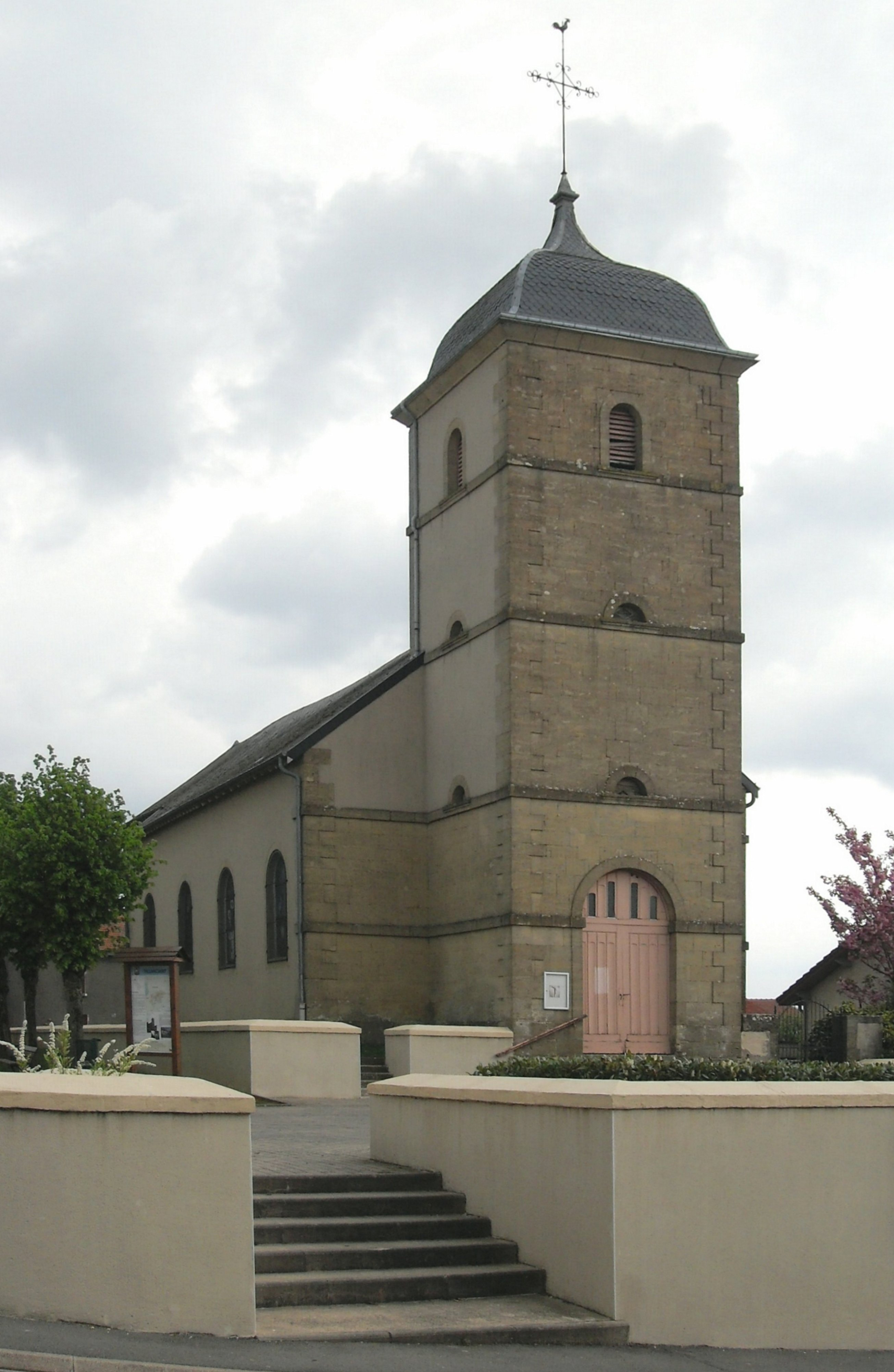 L'église de l'Assomption-de-la-Vierge à Tellancourt